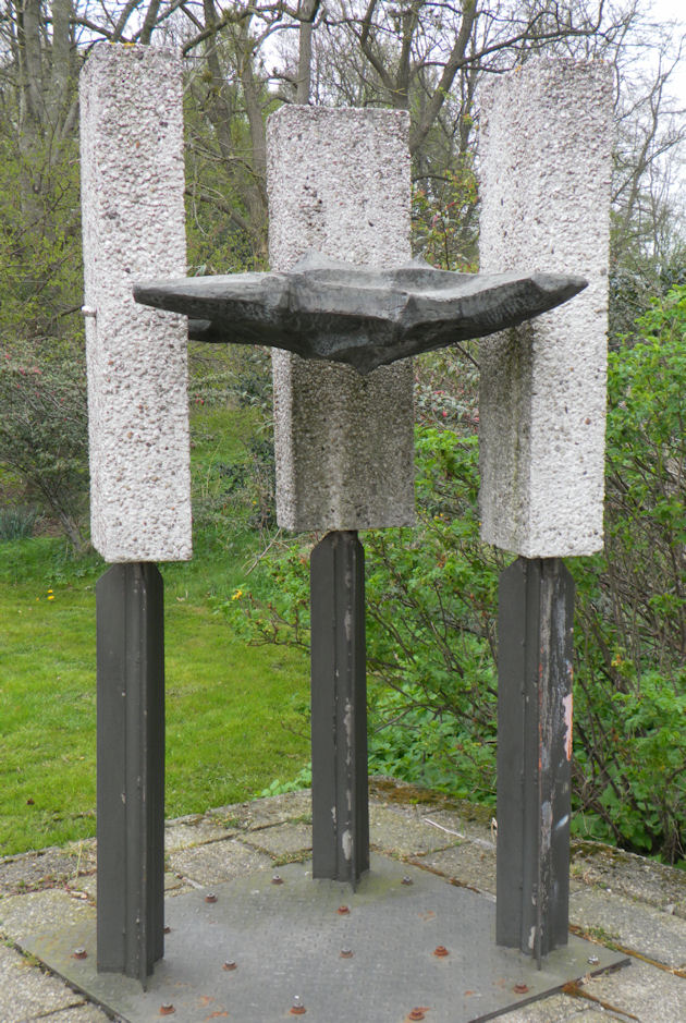 "3 Zuilen met vogel" van Herman Nieweg